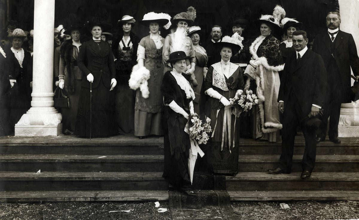 Opening van de tentoonstelling De Vrouw 1813-1913 op 2 mei 1913. Op de voorgrond mevrouw van Loon-Egidius (links) als vertegenwoordigster van koningin Wilhelmina, en Mia Boissevain (rechts), presidente van het tentoonstellingscomité. Tussen beide dames staand Rosa Manus, rechts op de trap minister Talma, bij de pilaar Commissaris van de Koningin mr. W.F. van Leeuwen. Foto gemaakt door A.J.W. de Veer (1875-1940).